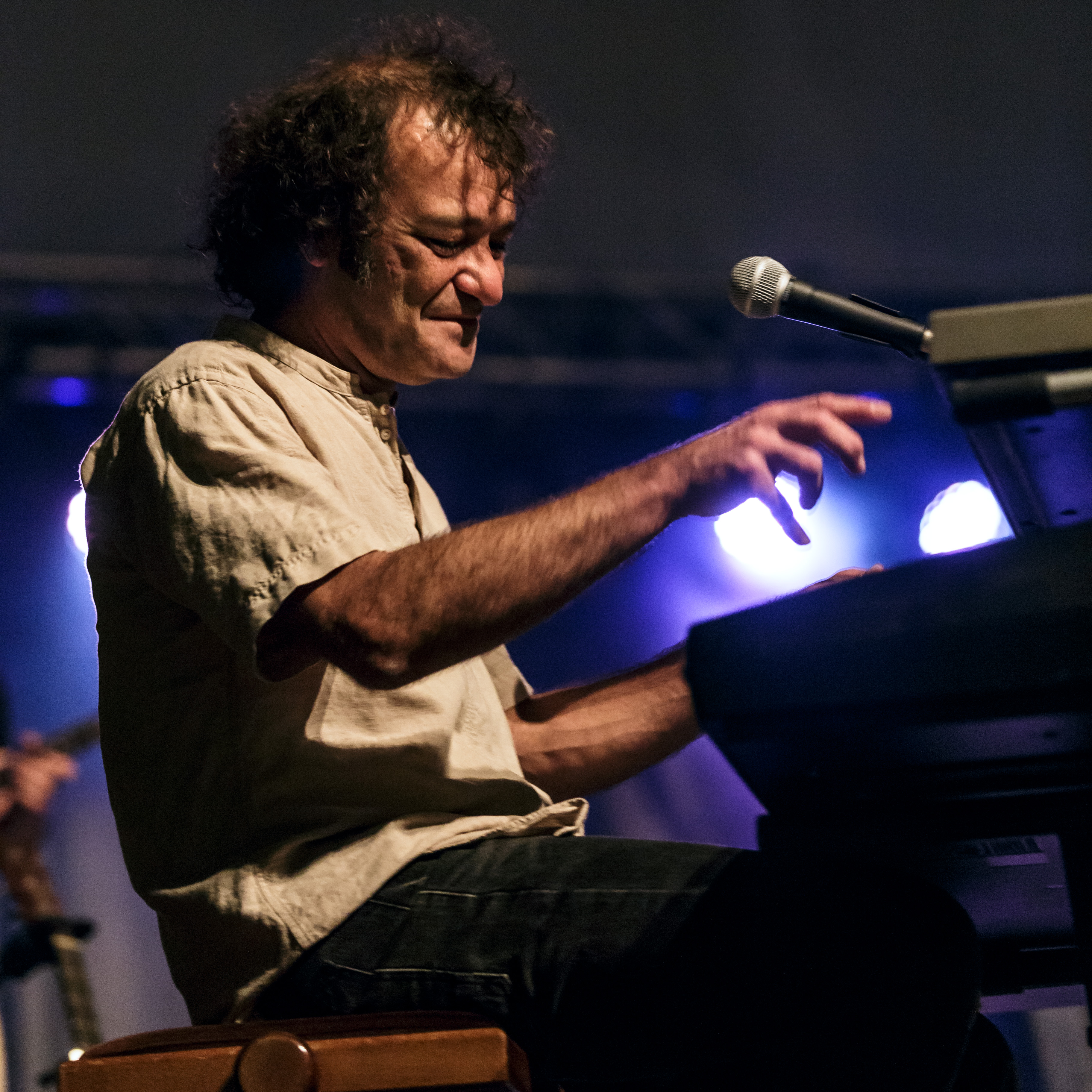 Tanaw, collectif de 12 musiciens réuni autour de Sylvère Morisson, en concert au festival de Cornouaille à Quimper le 21 juillet 2016.